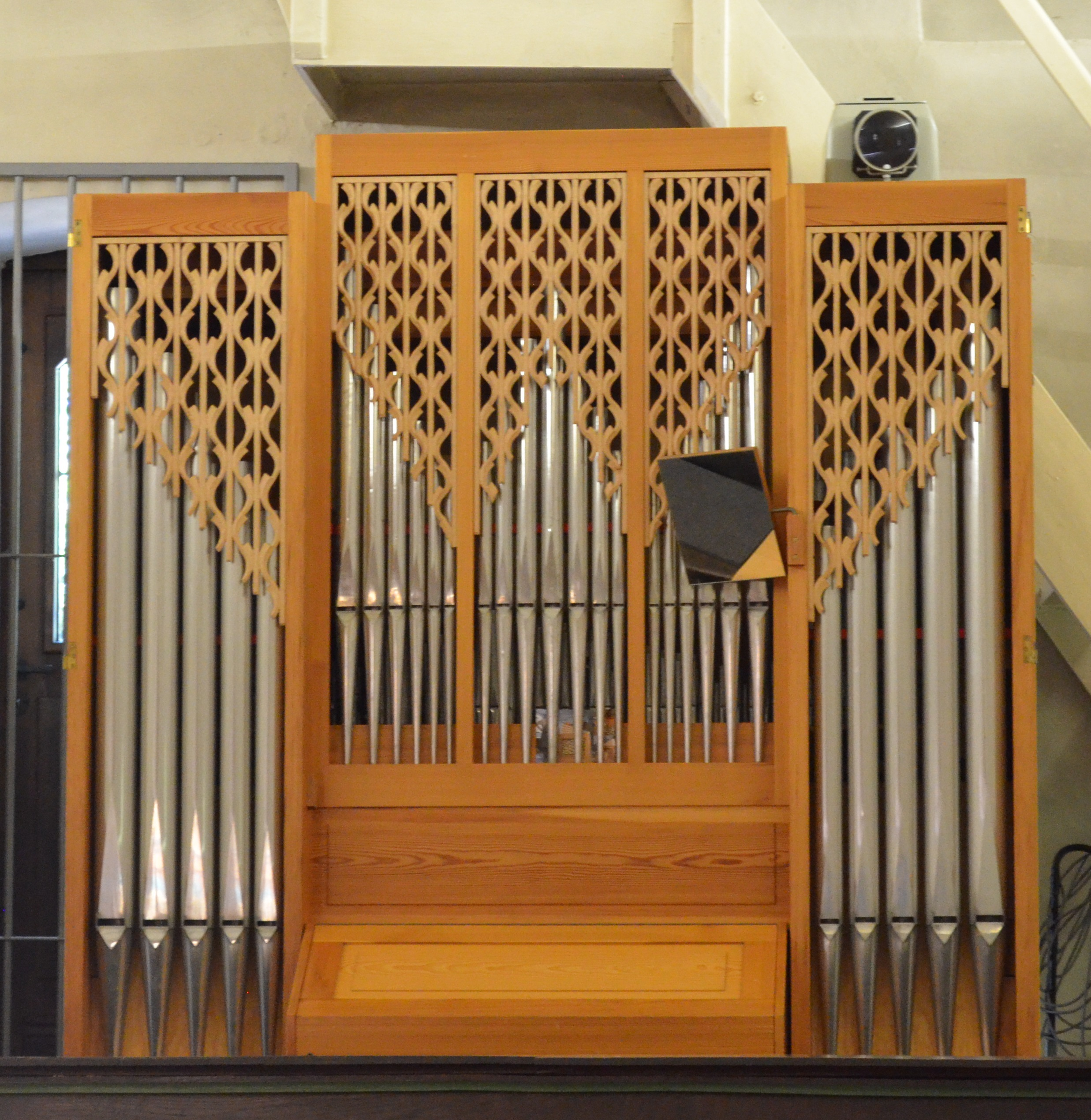 Kath. Wallfahrtskapelle Maria Hilf Beselich bei Obertiefenbach – Pfeifenorgel des Orgelbauer Schmid in Westendorf